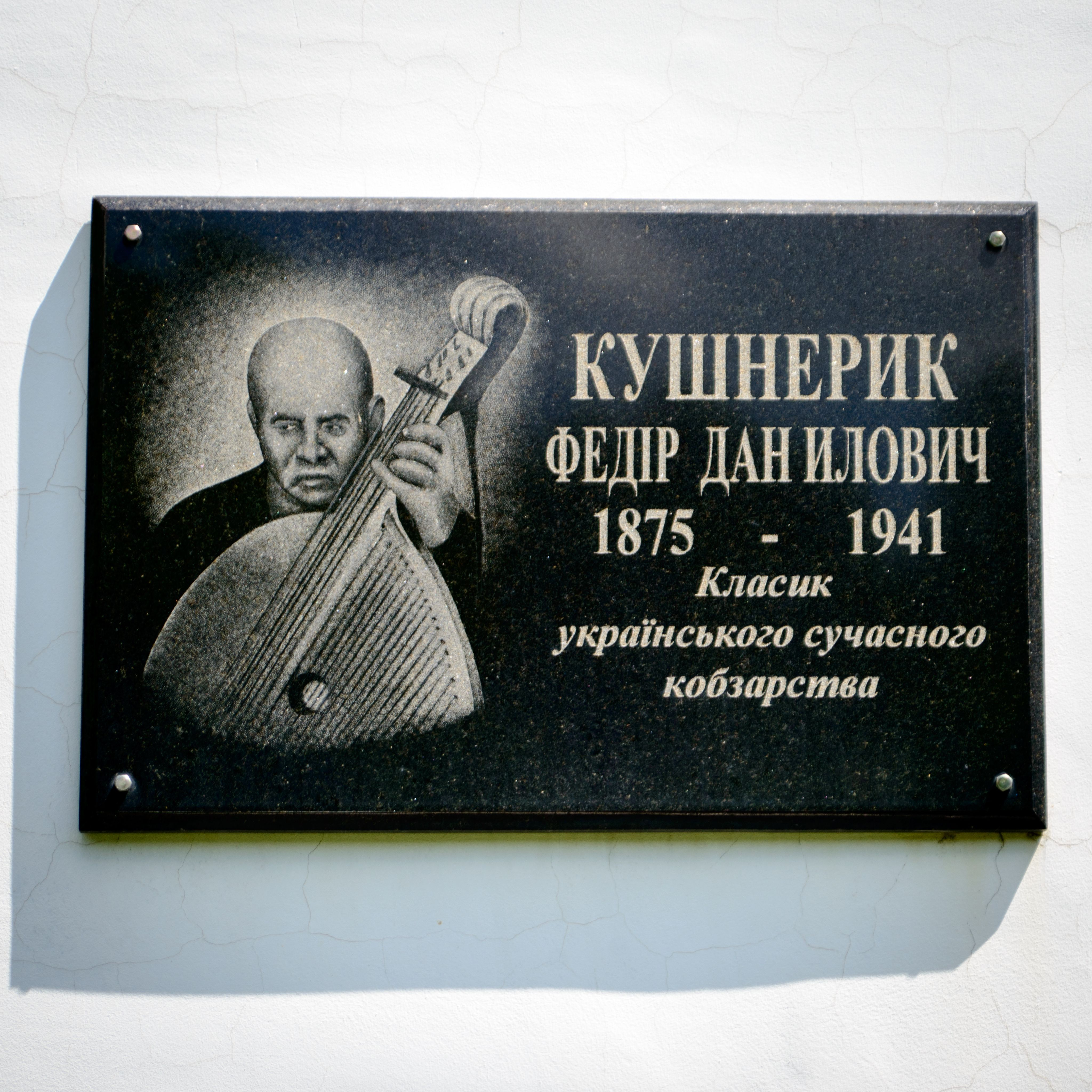 Пам’ятна дошка кобзареві Ф.Д.Кушнерику., Велика Багачка смт, Леніна вул., 22.